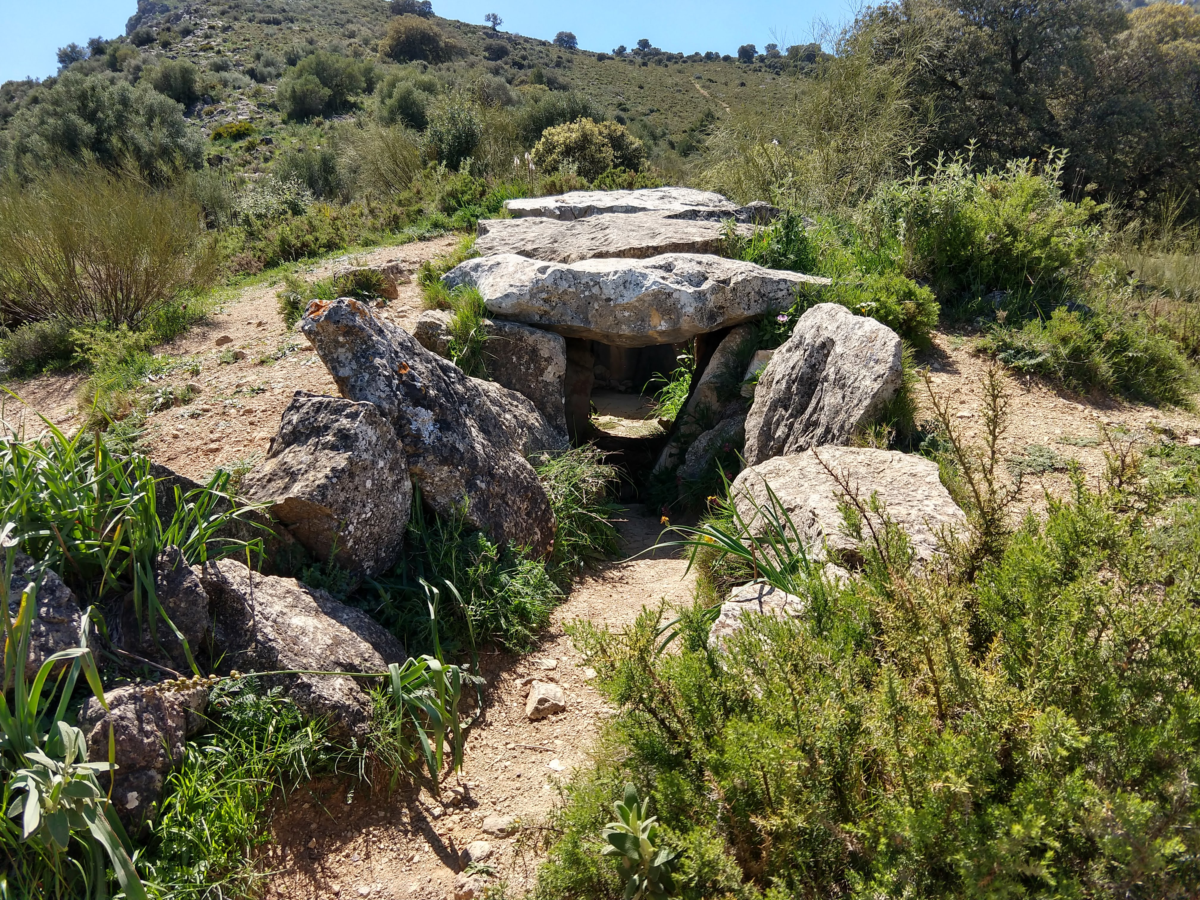 Vista frontal del Dolmen del Gigante, en Montecorto, en abril de 2018.